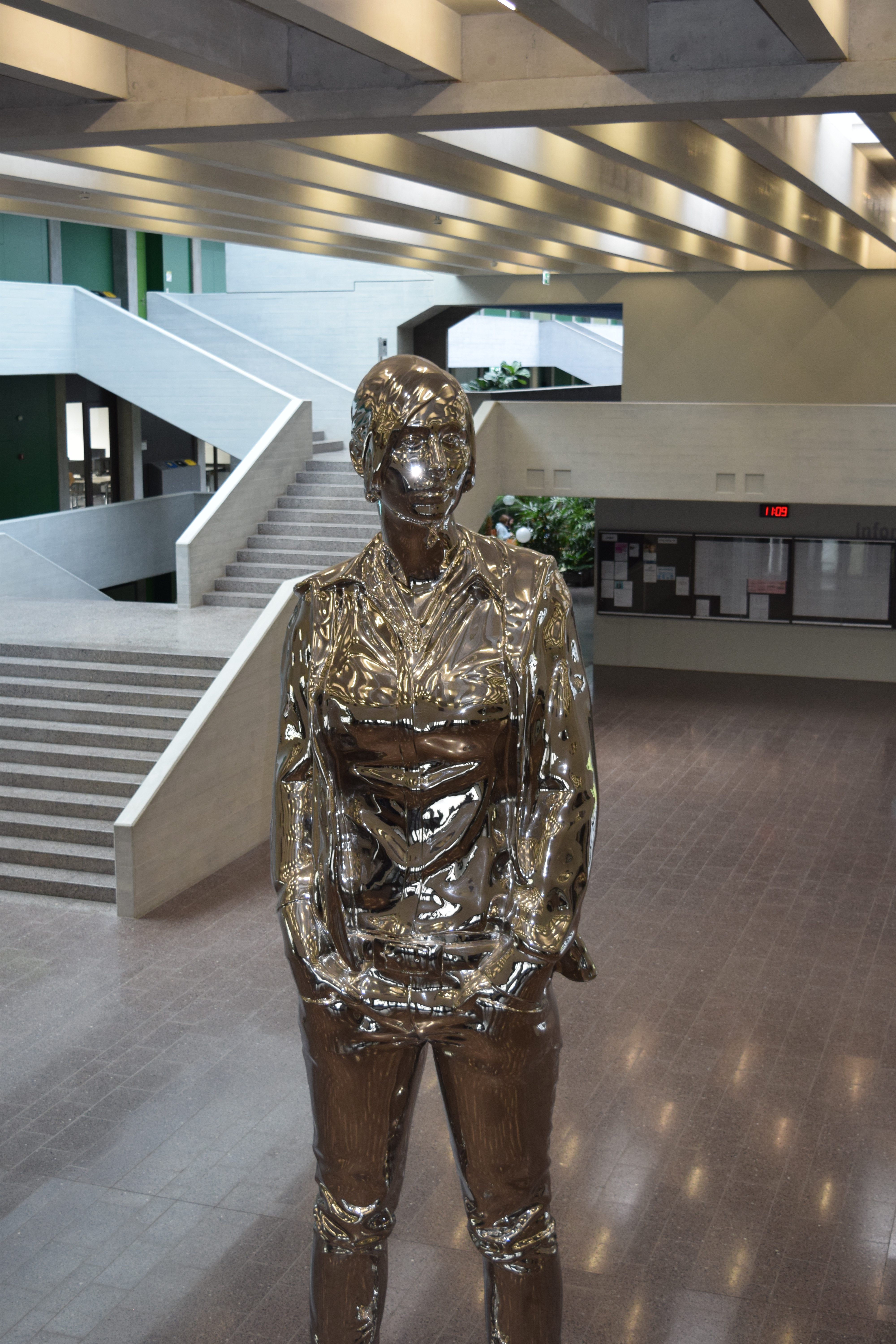 Kunst am Bau